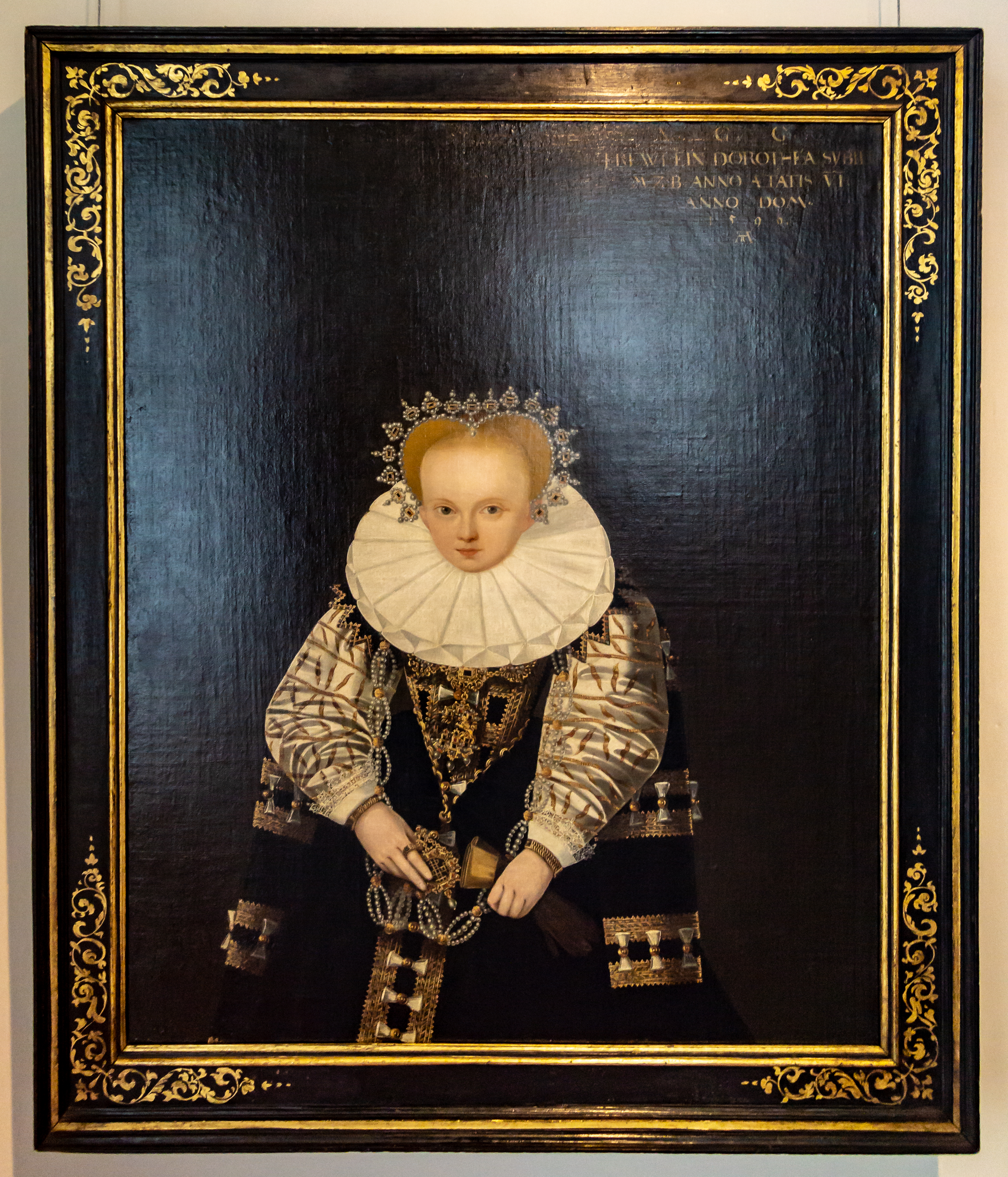 Andreas Riehl der Jüngere: Dorothea Sibylle von Brandenburg